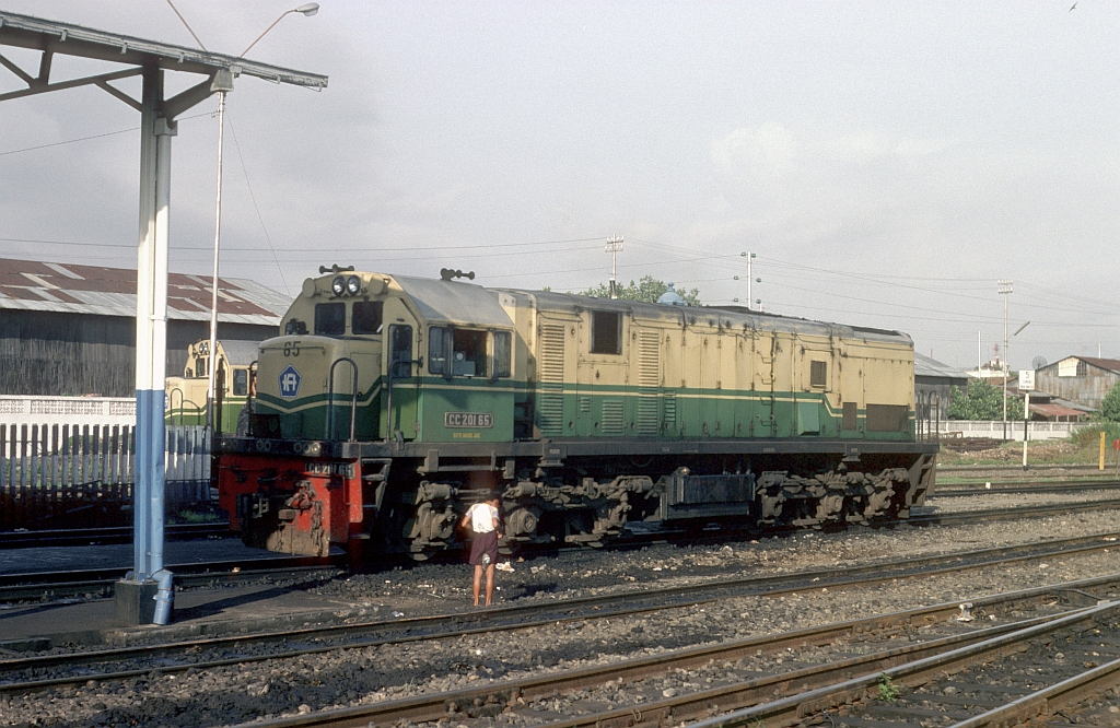 PTKACC201 (201 065 A), Datum ca